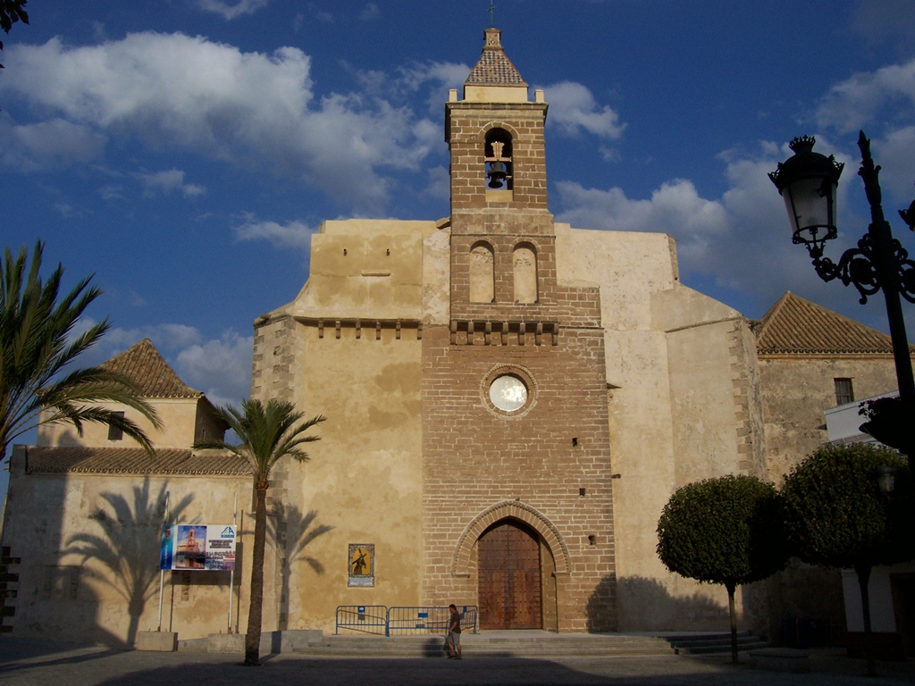 Fachada occidental de la parroquia de Ntra. Sra. de la O, en Rota-Cádiz-Andalucía-España